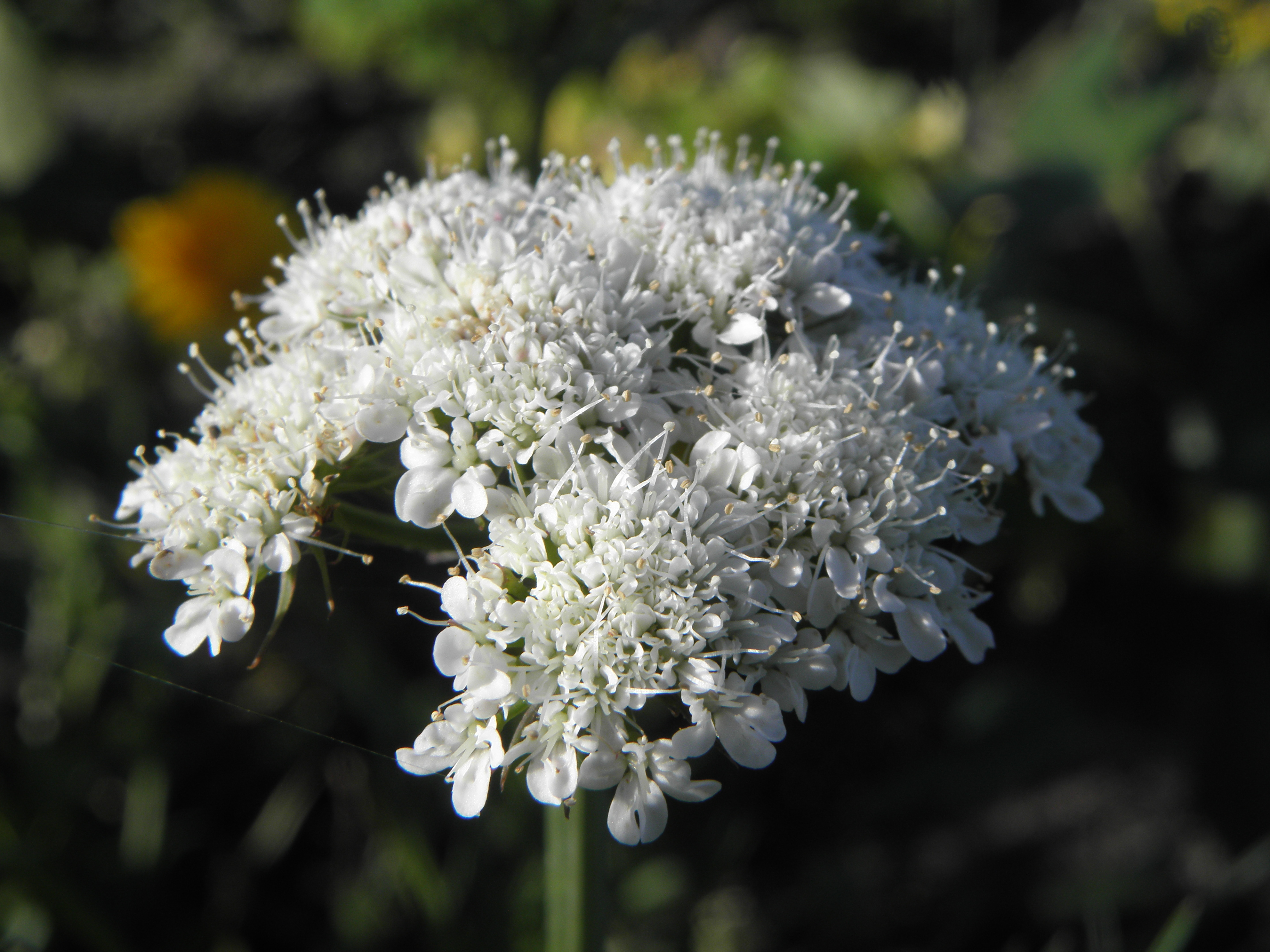 Bunium bulbocastanum